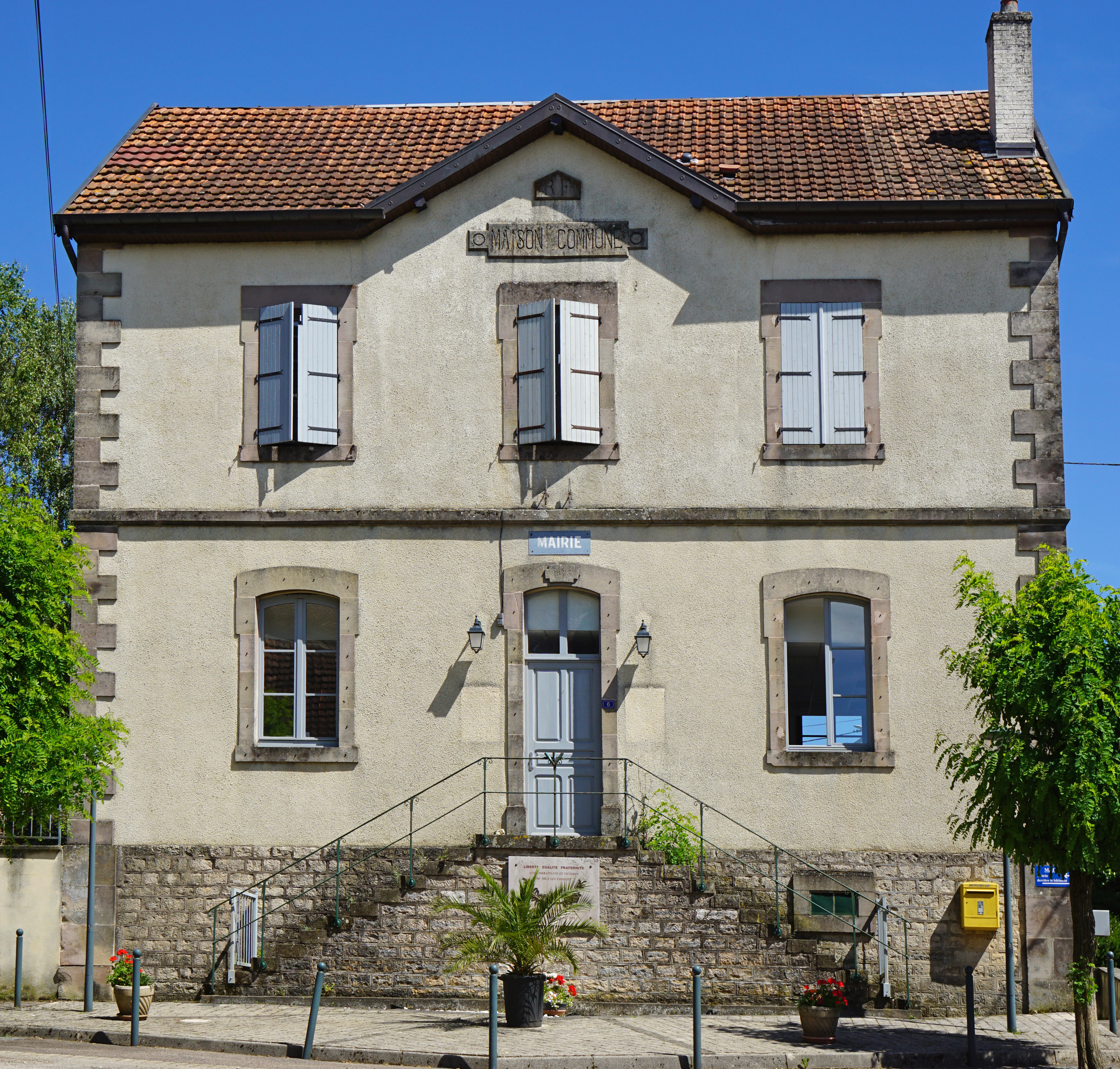 Mairie de Pont-sur-l'Ognon.